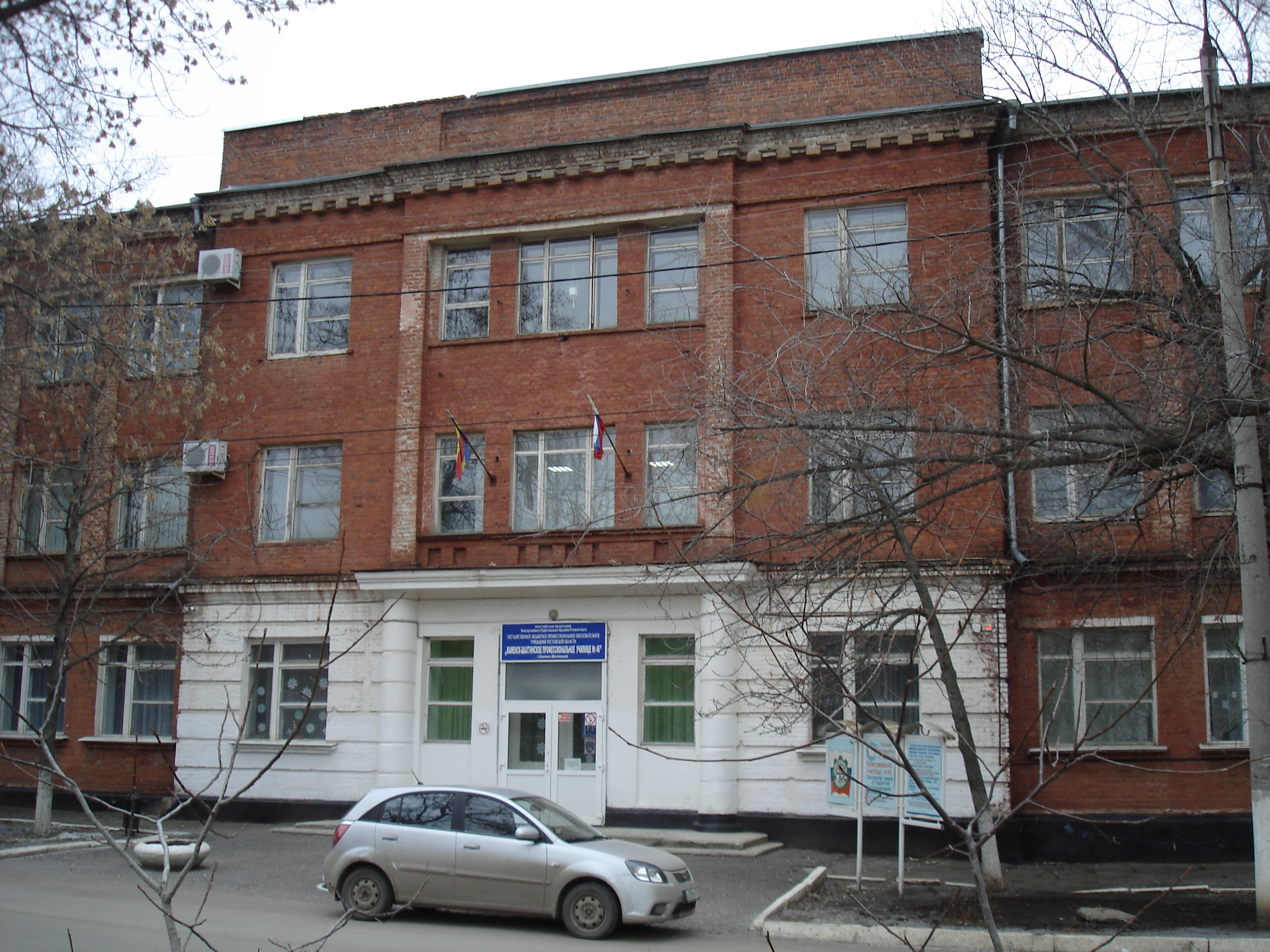 Каменск-Шахтинский, район "комбината", профессиональное училище №46